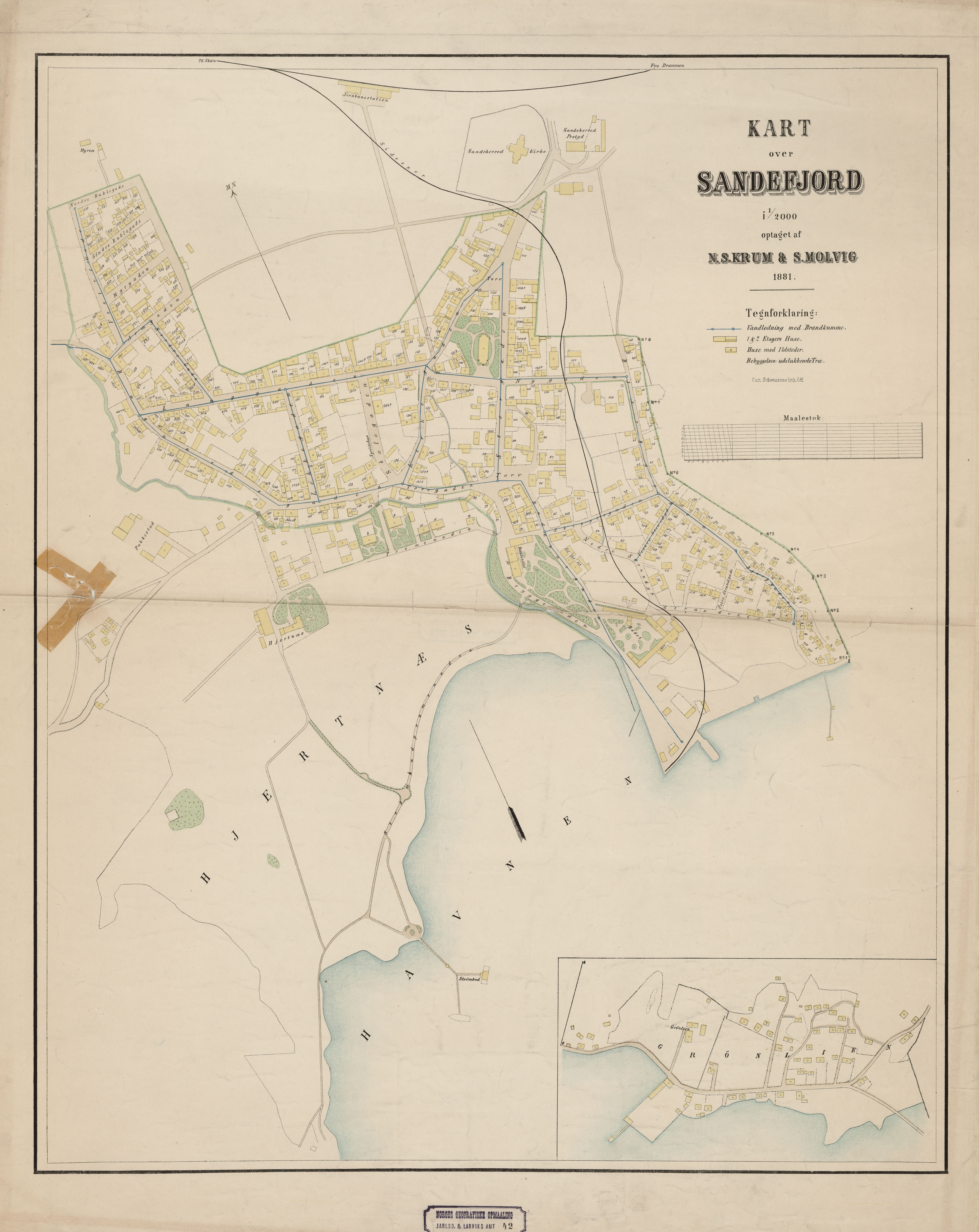 Kart over Sandefjord. Lit. Ca. Schwenzens lit. Officin.